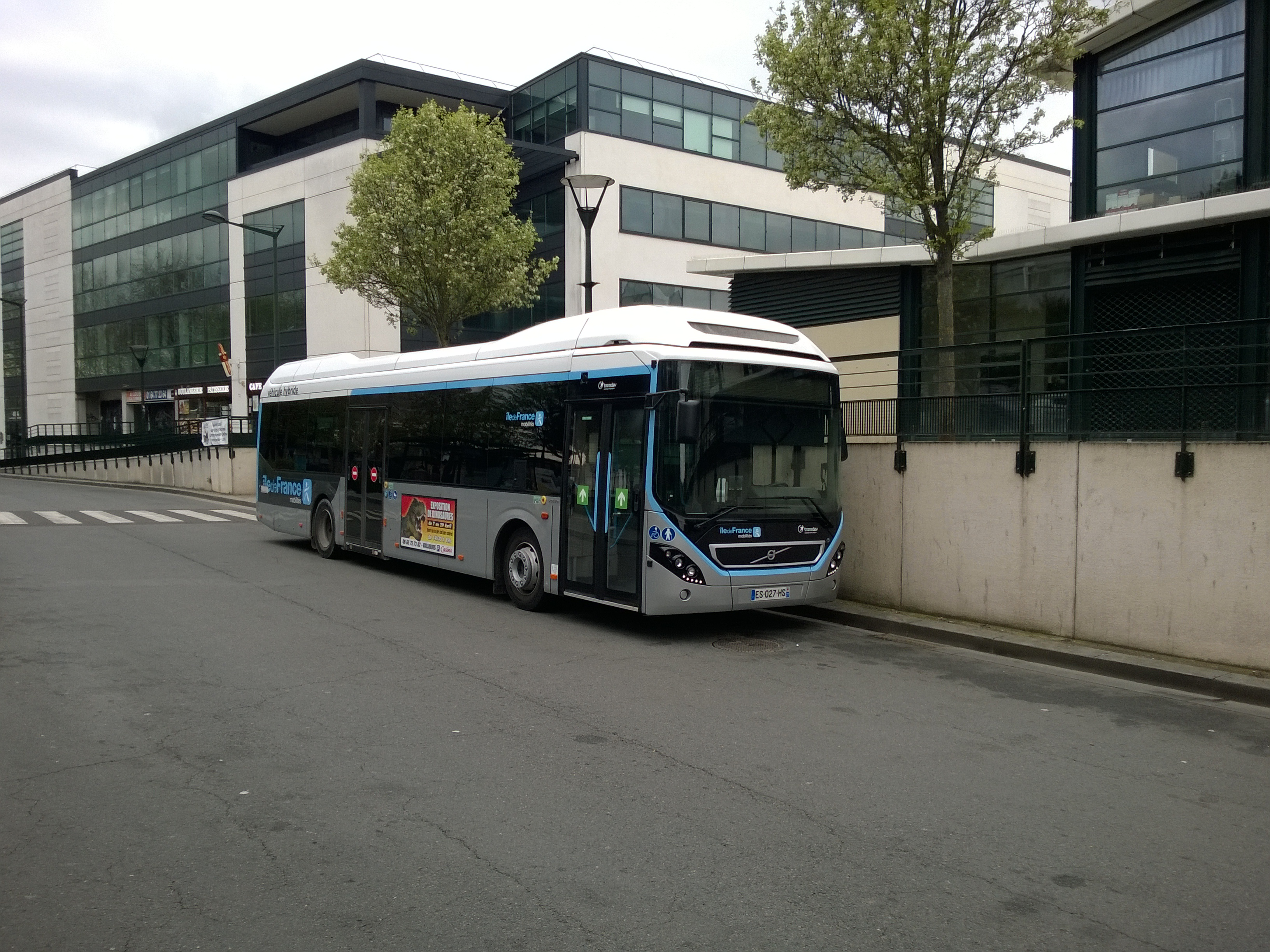 Un nouveau bus de la STBC (Volvo 7900 hybride), en bordure de la gare routière de la gare de Chelles.